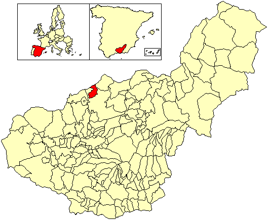 Situación del término municipal de Campotéjar respecto a la provincia de Granada, en España.